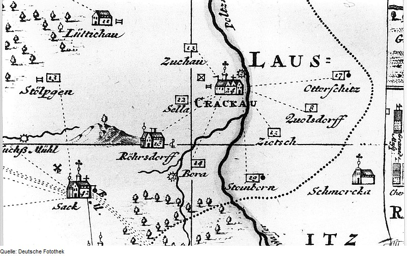 Original image description from the Deutsche FotothekKrakau. Karte des Amtes Großenhain, von Zürner, 1711, Nachträge 1730 (Sign.: VII 108). Ort existiert nicht mehr